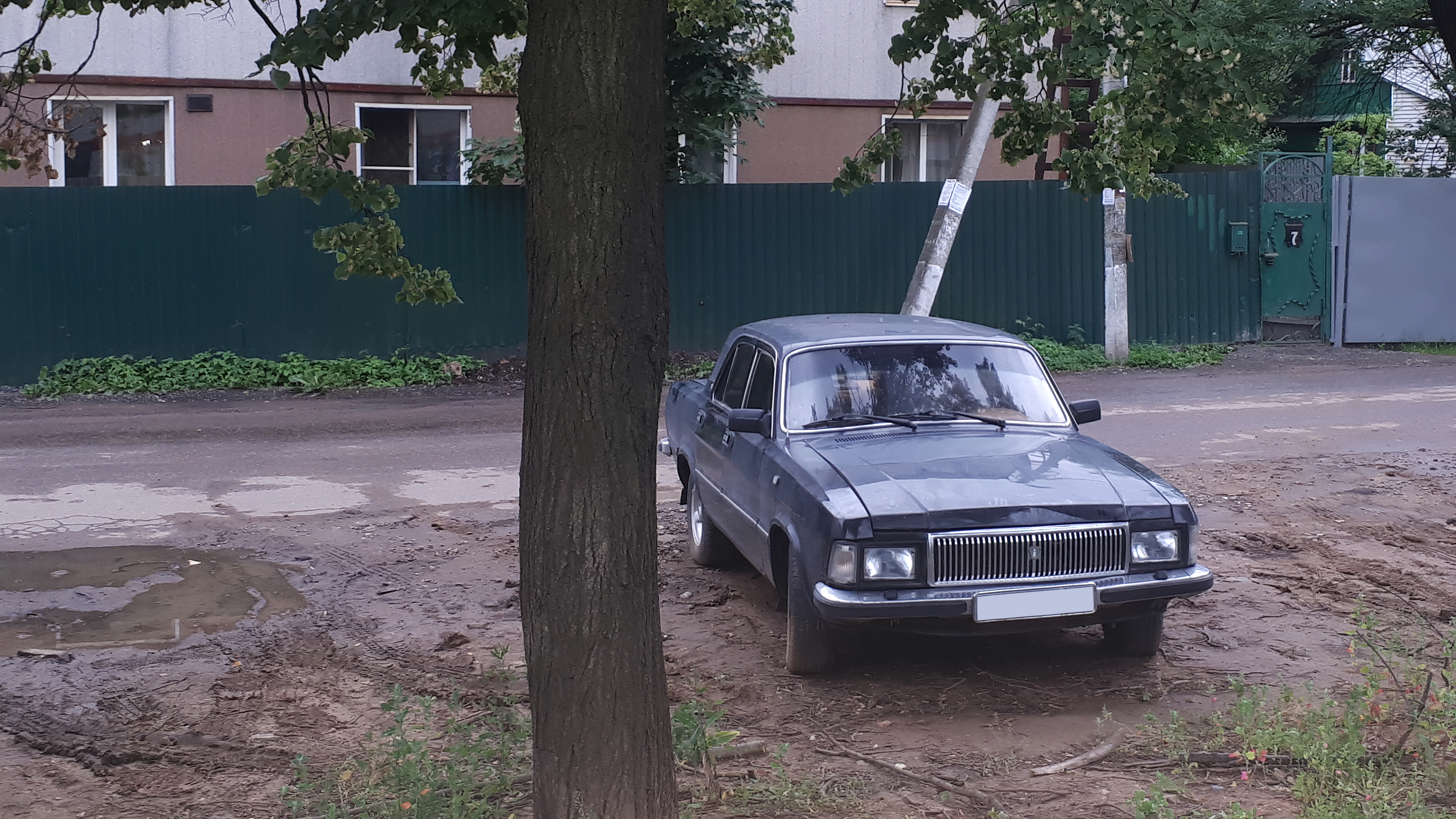 ГАЗ-3102 последней модификации.